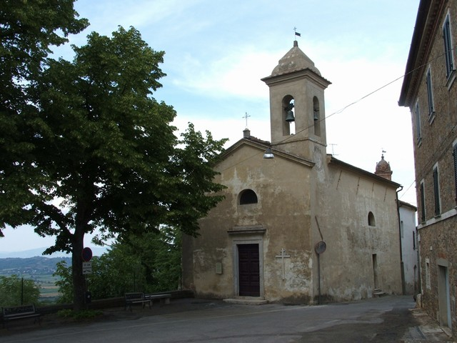 Esterno Chiesa di San Giovanni Battista Farnetella (Siena)